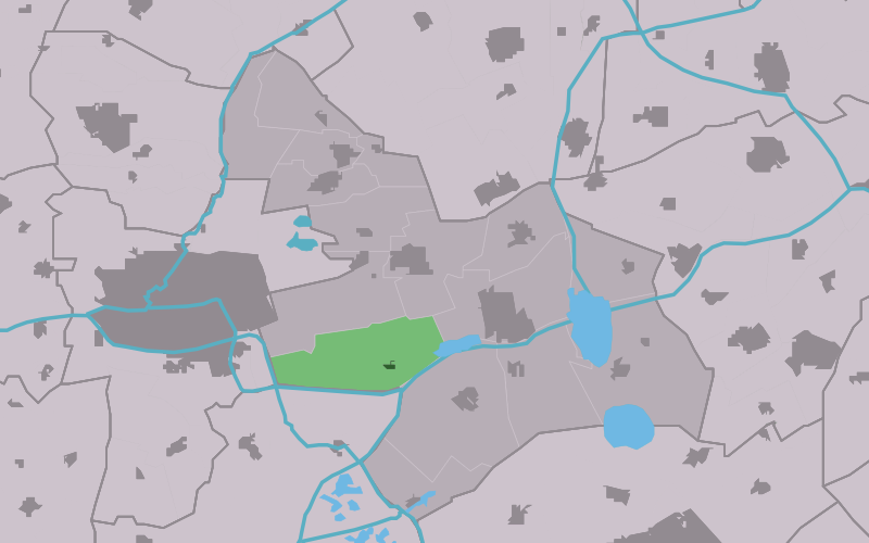 Kaartsje fan himrik fan Sûwald